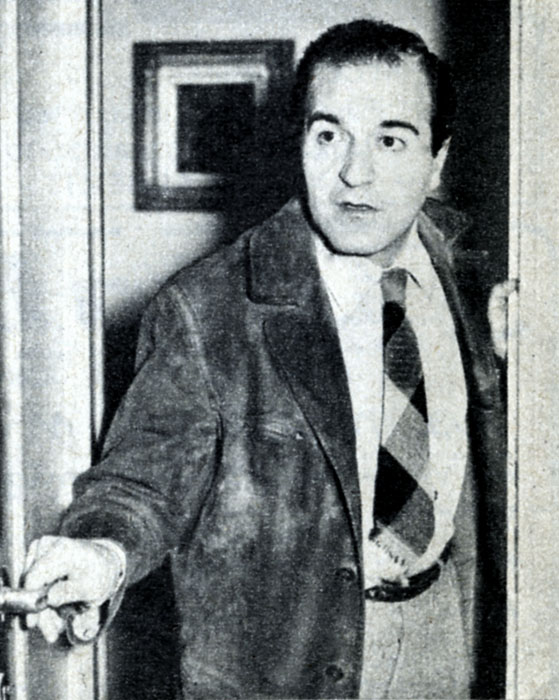 photo from magazine Radiocorriere (1954)